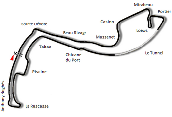 Verzia trate z rokov 1976 až 1985.